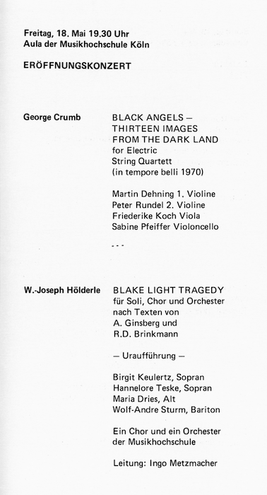 Scan eines Konzertprogrammes aus 1984 in Köln / Programmheft / Eröffnungskonzert Festival '84 der GfkI